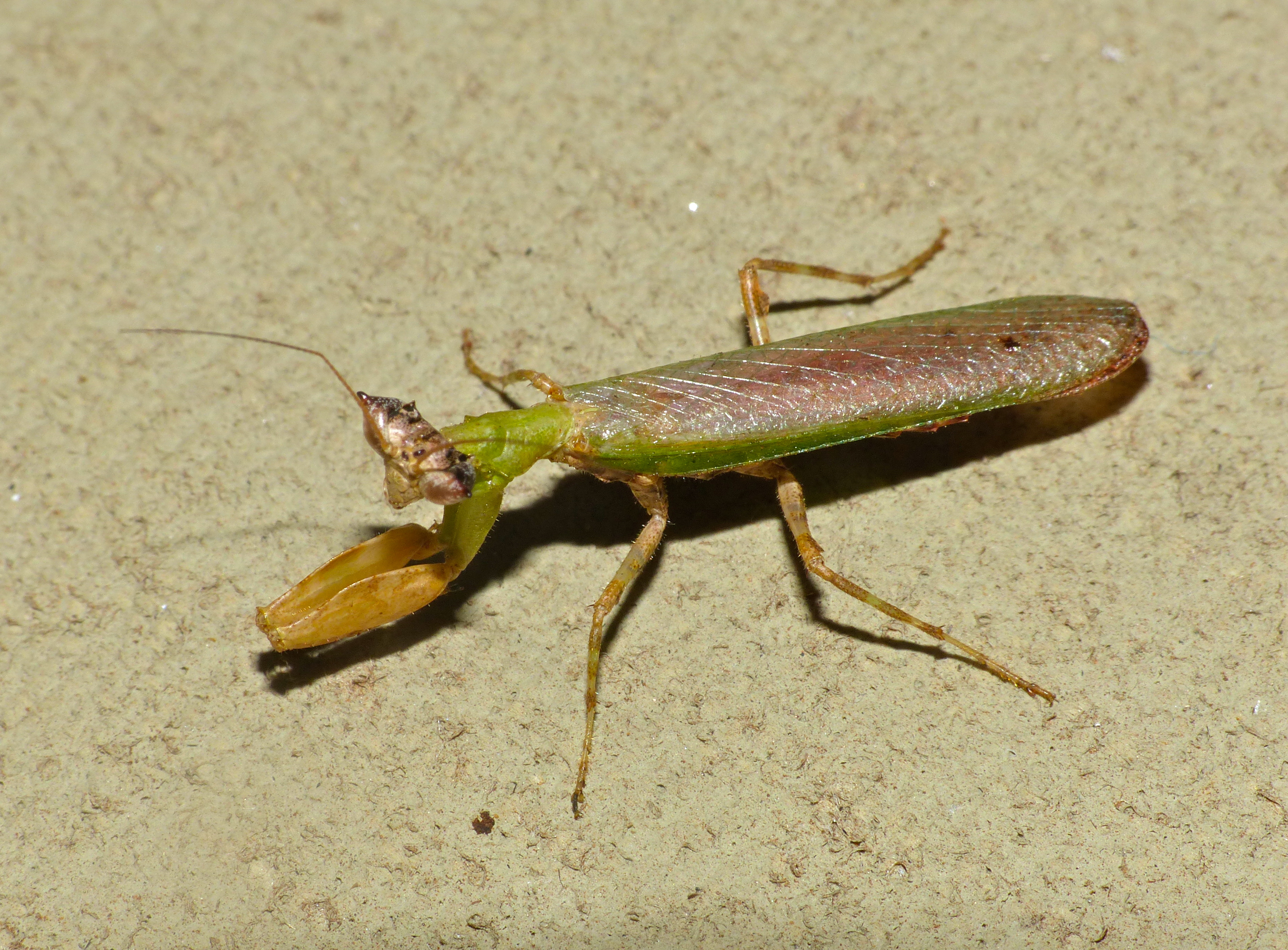 Safari Tent N°7, Lower Sabie Camp, Kruger NP, SOUTH AFRICA